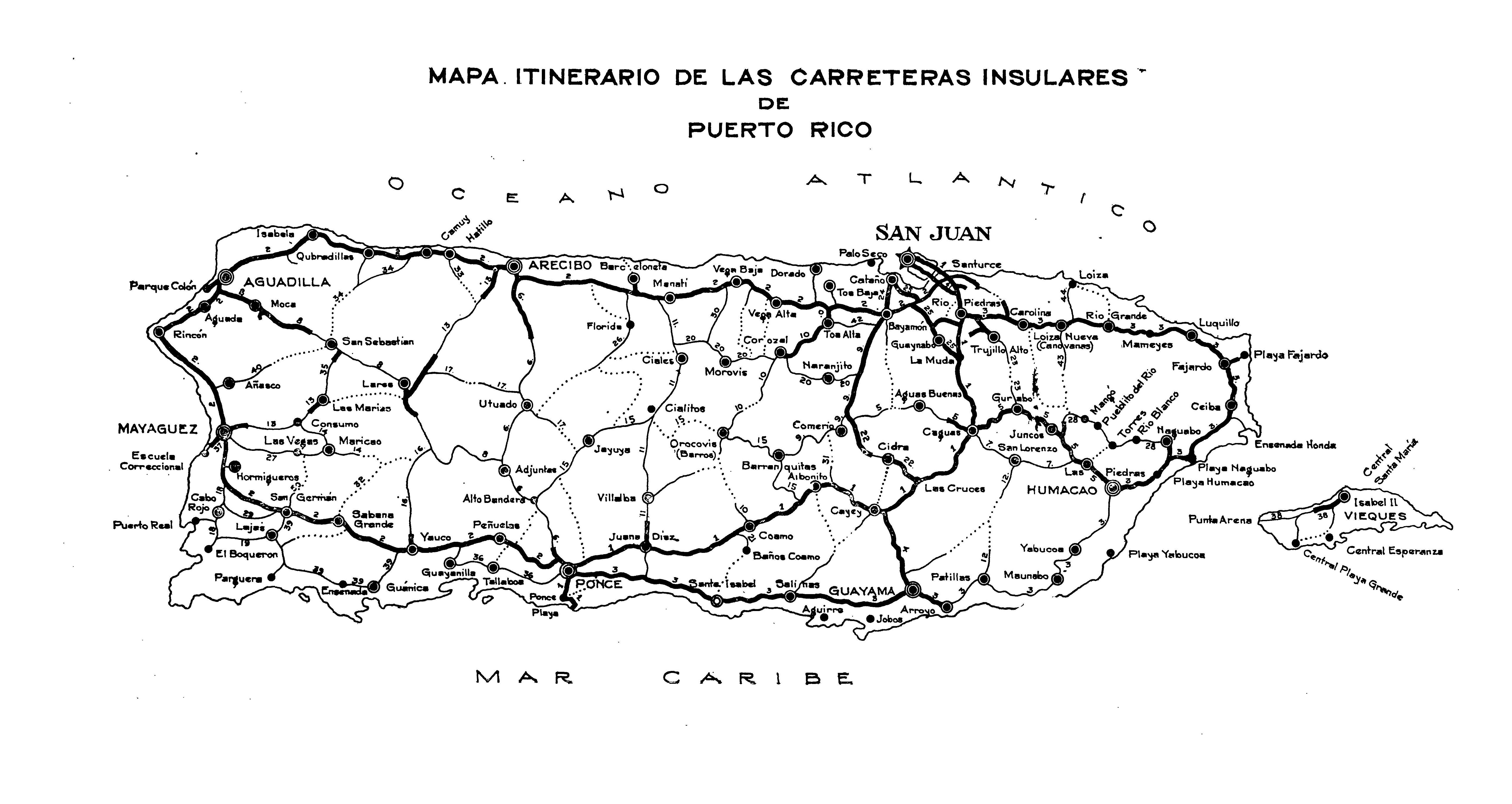 Mapa. Itinerario de las carreteras insulares de Puerto Rico. Gobierno de Puerto Rico, Departamento del Interior, Negociado de obras publicas, San Juan, Puerto Rico, August 30, 1928